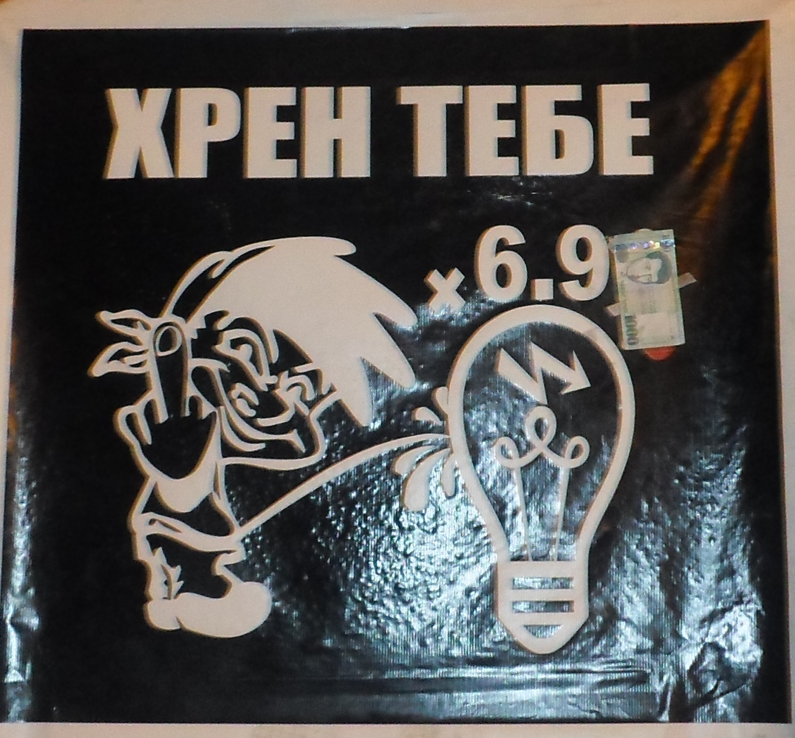 Բողոքի պլակատ ուղղված էլեկտրաէներգիայի թանկացմանը